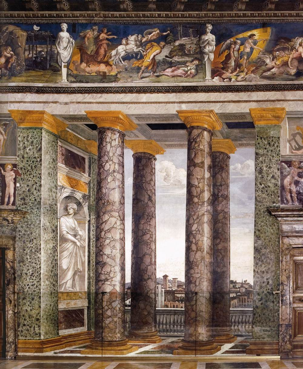 Frescos, Sala delle Prospettive, Villa Farnesina, Rome